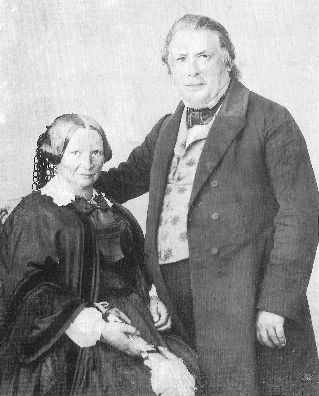 Sophie Walz geb. Schurr (1806–1869) und Gustav Walz (1804–1876) – die Eltern von Mathilde Weber)